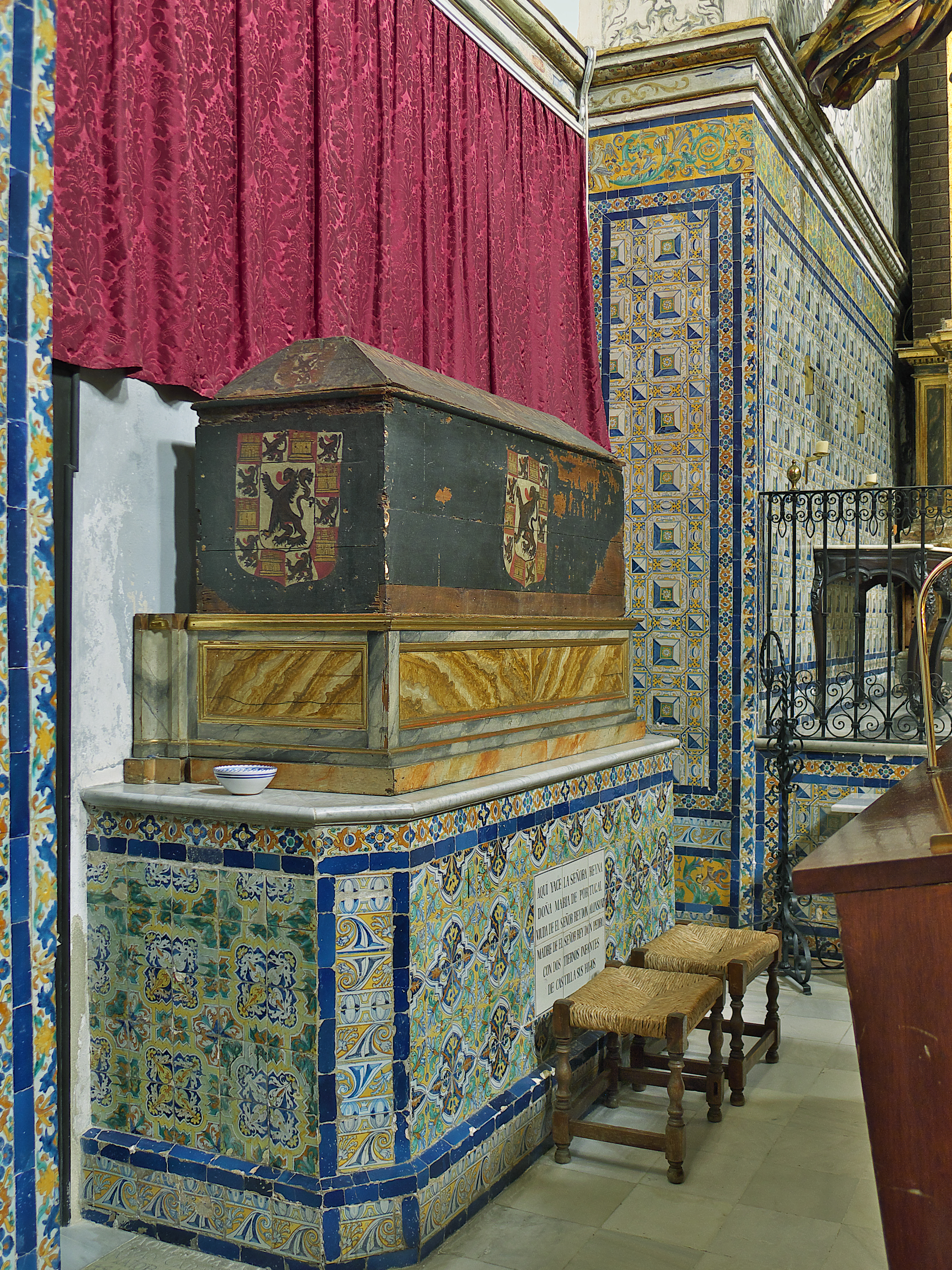 Real Monasterio de San Clemente (Sevilla). Tumba de la reina María de Portugal (1313-1357), y dos hijos, infantes de Castilla, don Fernando y otro desconocido. Fue reina consorte de Castilla y León por su matrimonio con Alfonso XI de Castilla y madre del rey Pedro I de Castilla, cuyos restos mortales reposan en la Capilla Real de la catedral de Sevilla. Este sepulcro es una referencia para equiparar el sustituido de Alonso Pérez de Guzmán (†1309).